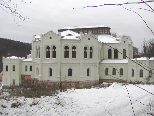 Tachov, Světce, rekonstruovaná novorománská jízdárna.